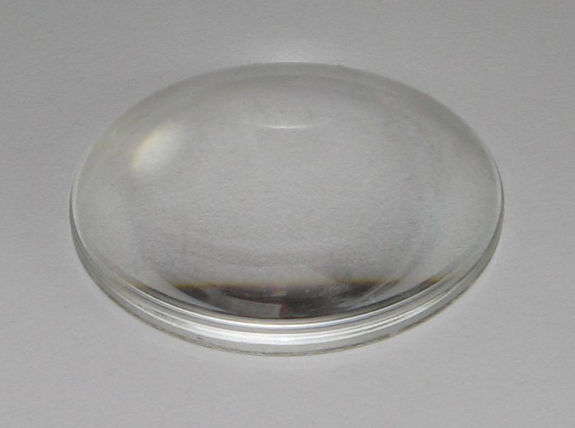 Ebenkonveksa lenso